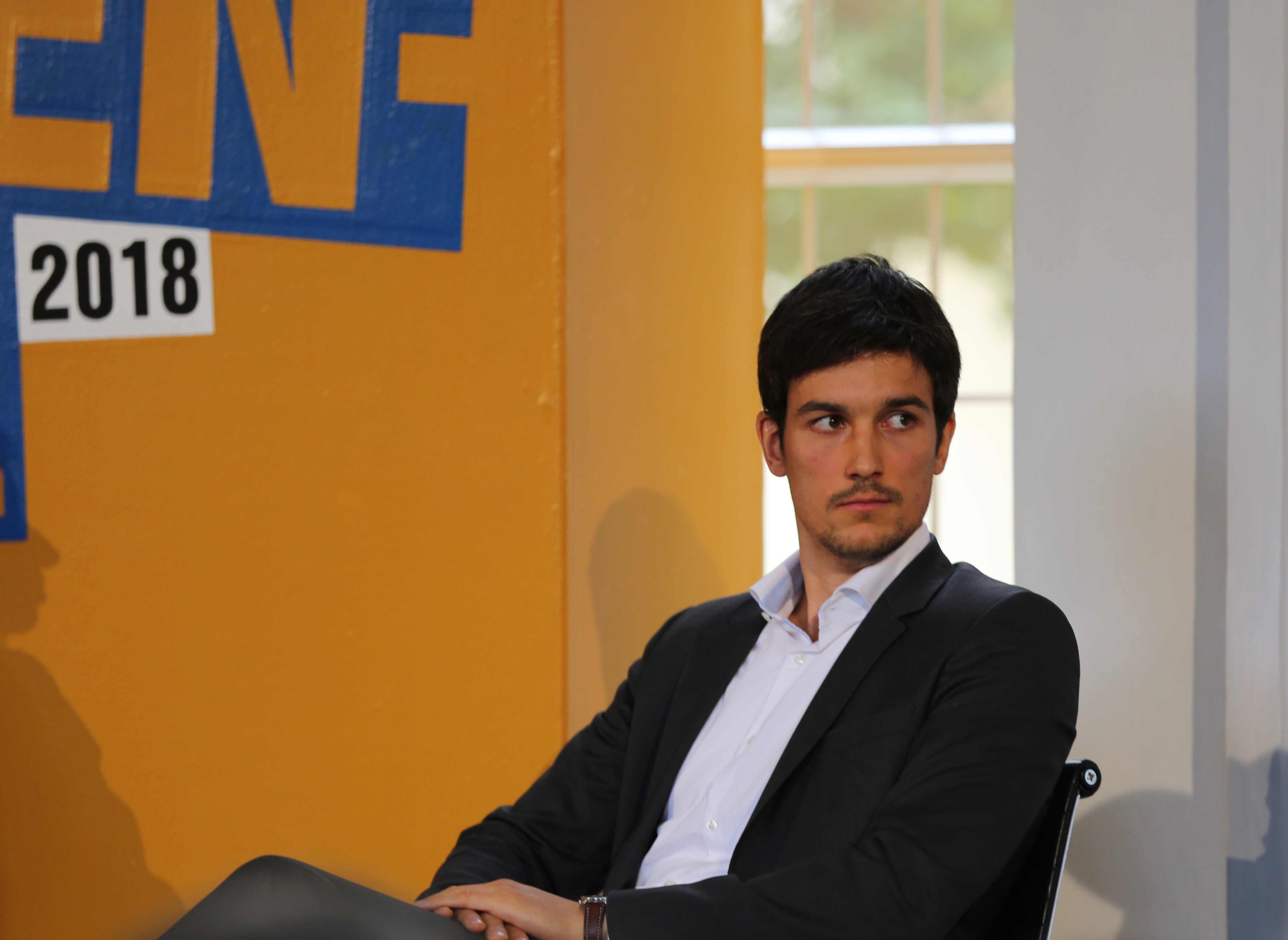 Aktivist, Autor und Feminist Vincent-Immanuel Herr auf dem Erlanger Poetenfest 2018